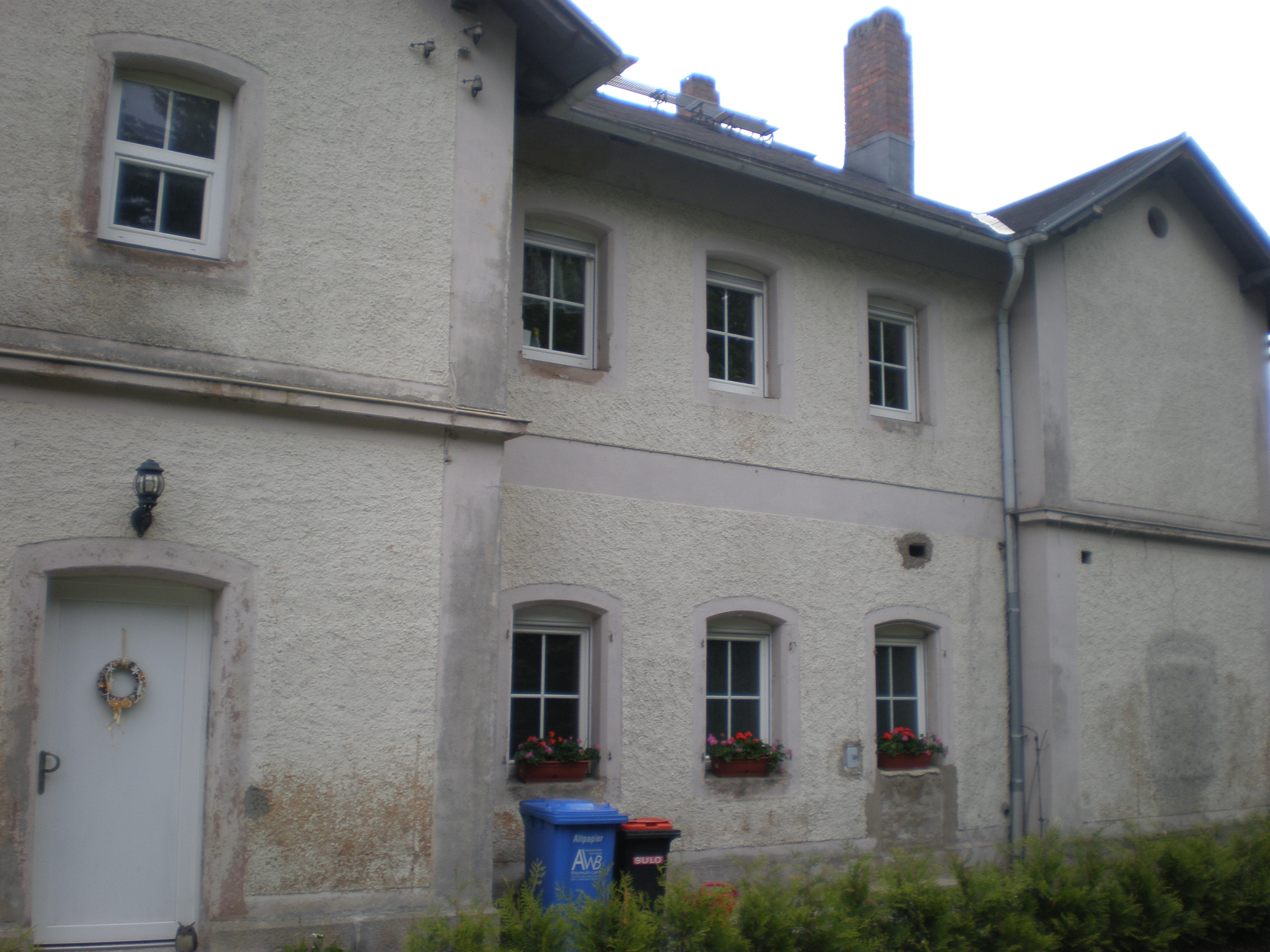 Bahnhof in Falls von der Straßenseite aus gesehen